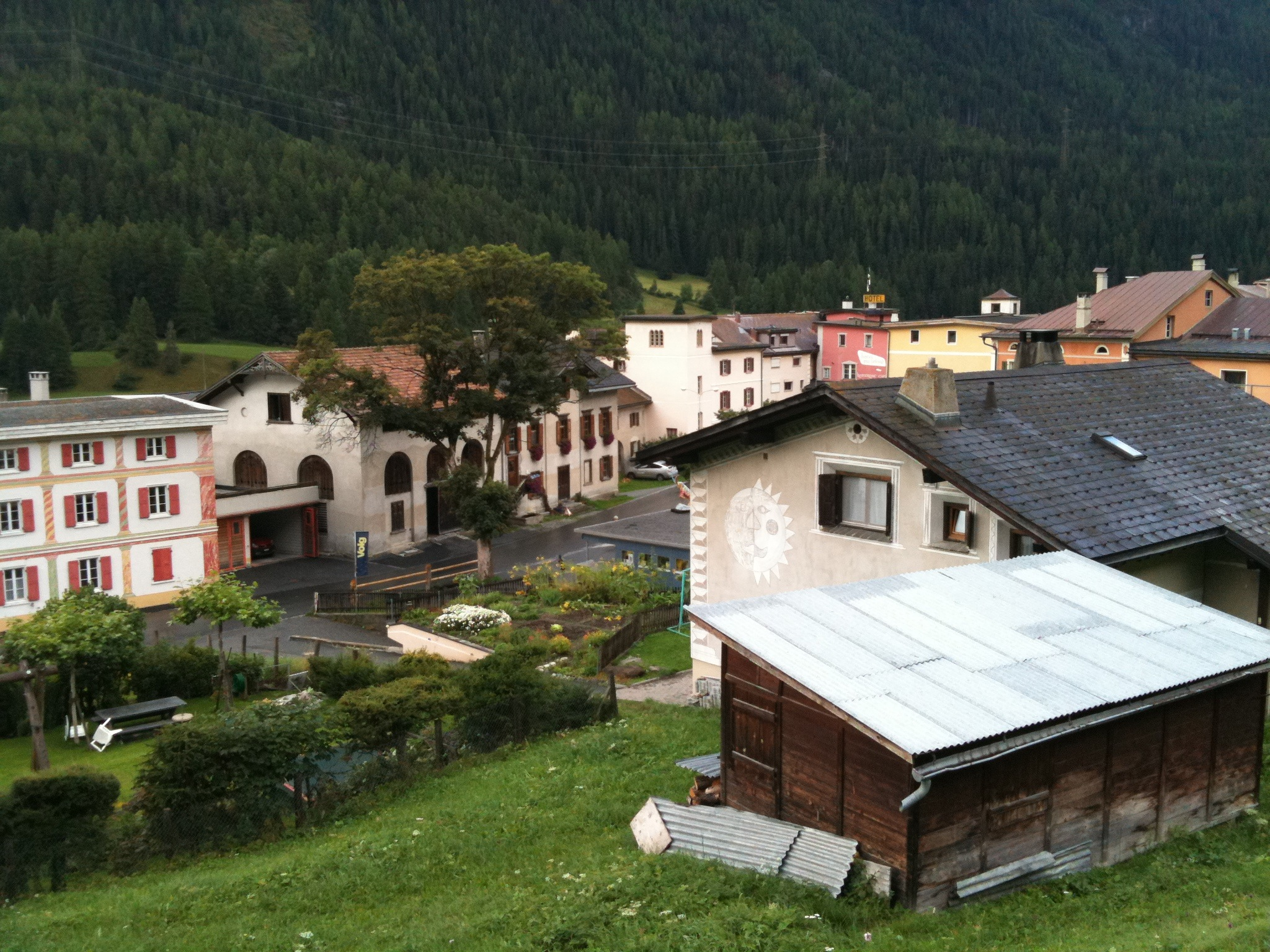 Dorfzentrum von Lavin im Kanton Graubünden